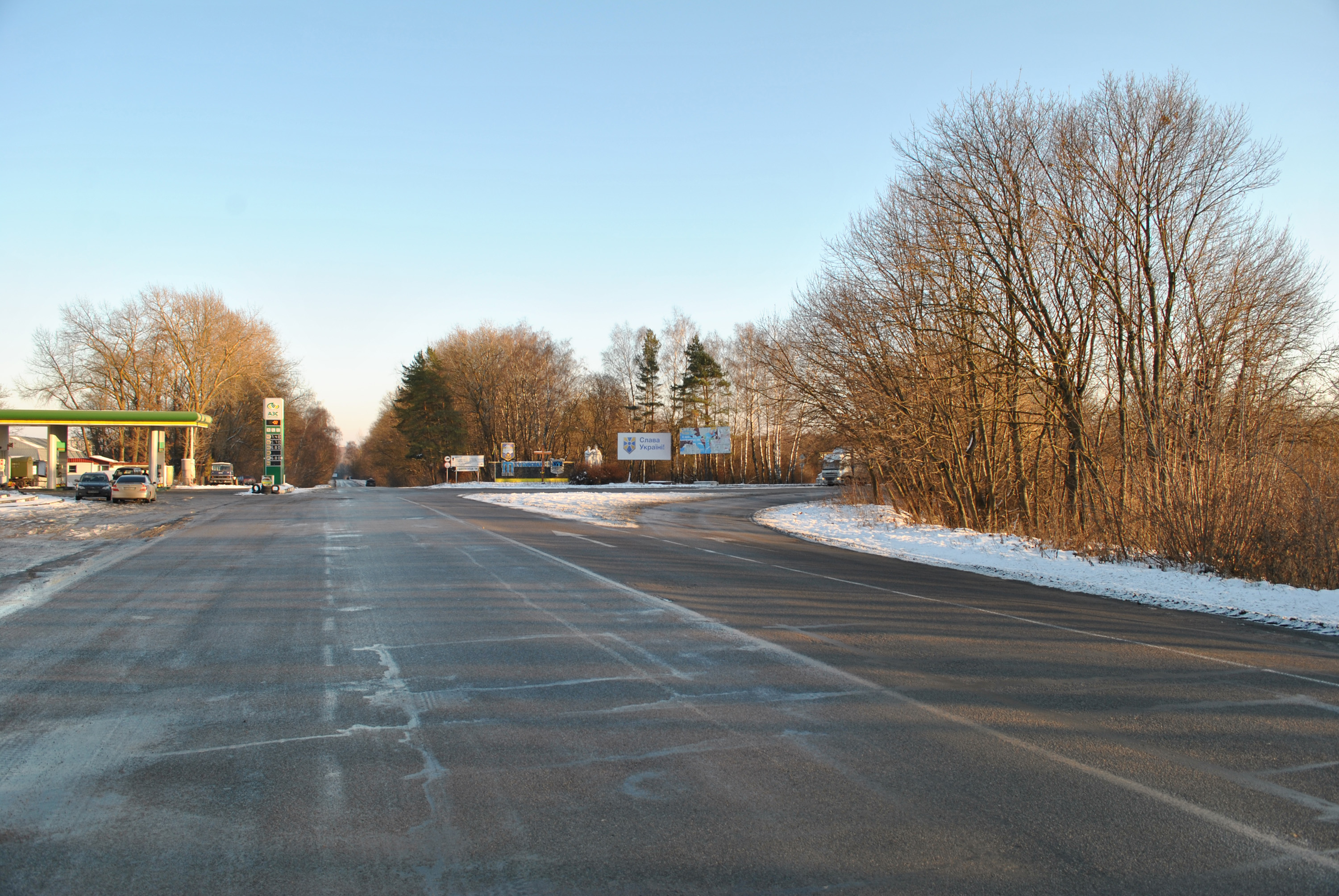 Автомобільний шлях Н 02 національного значення на відтинку при в'їзді в Тернопіль. Прямо — до Тернополя, направо — об'їзна в напрямку Чернівців.